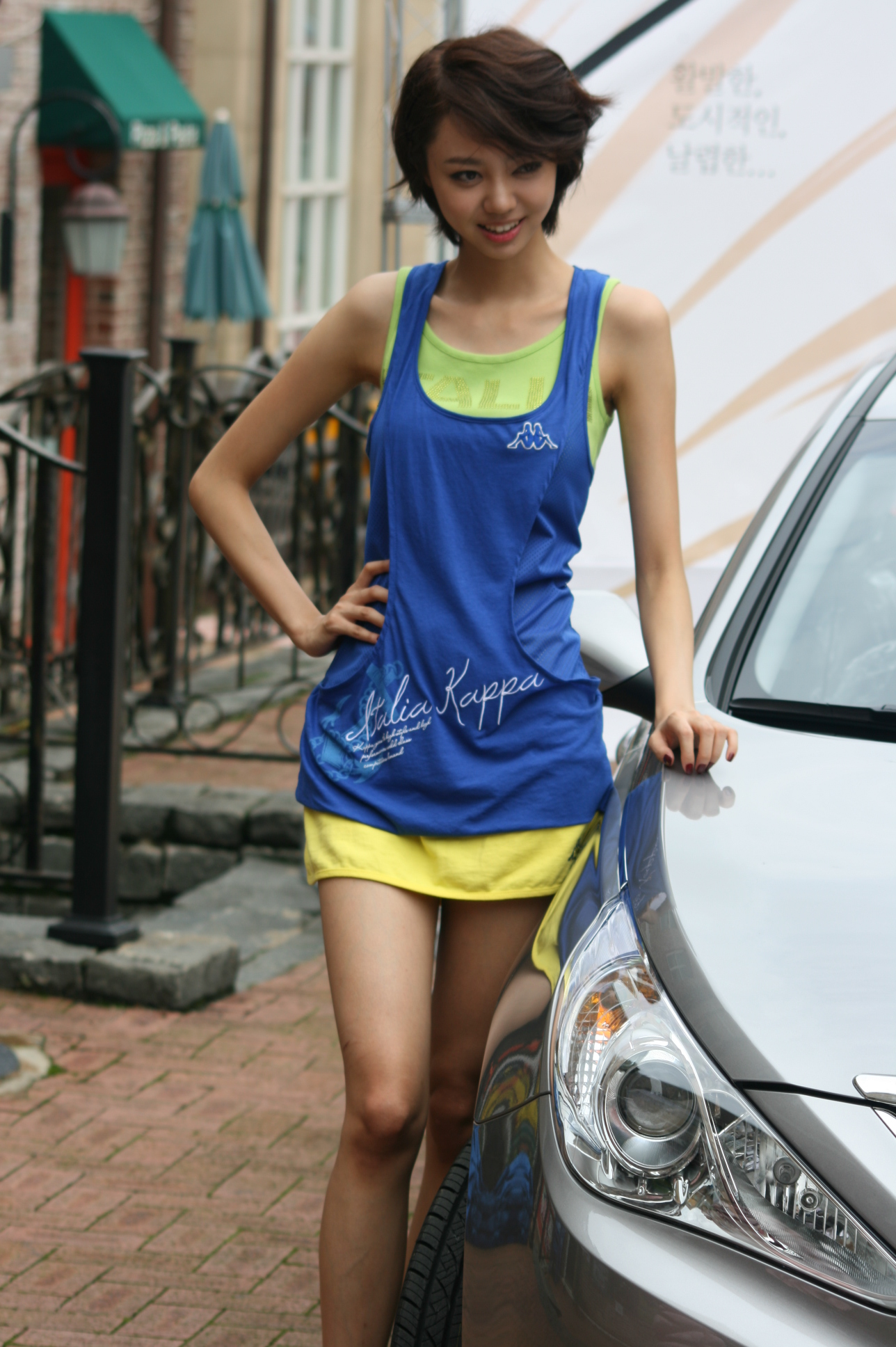 2010 슈퍼모델 쏘나타를 만나다